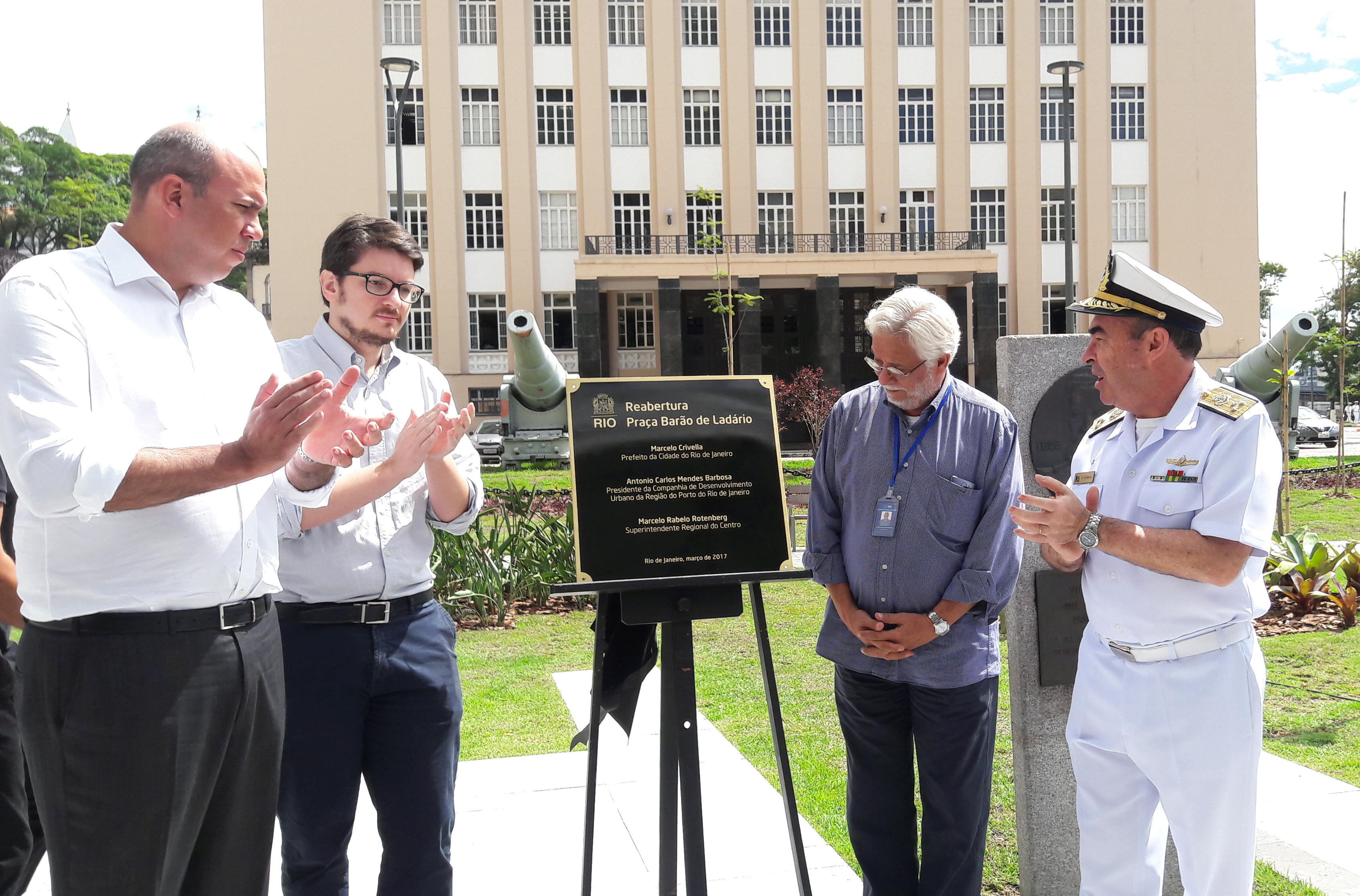 Reabertura da Praça Barão de Ladário, Rio de Janeiro - RJ, Brasil.